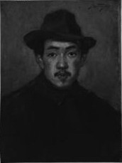 笠原軔「自画像」 東京藝術大学大学美術館所蔵